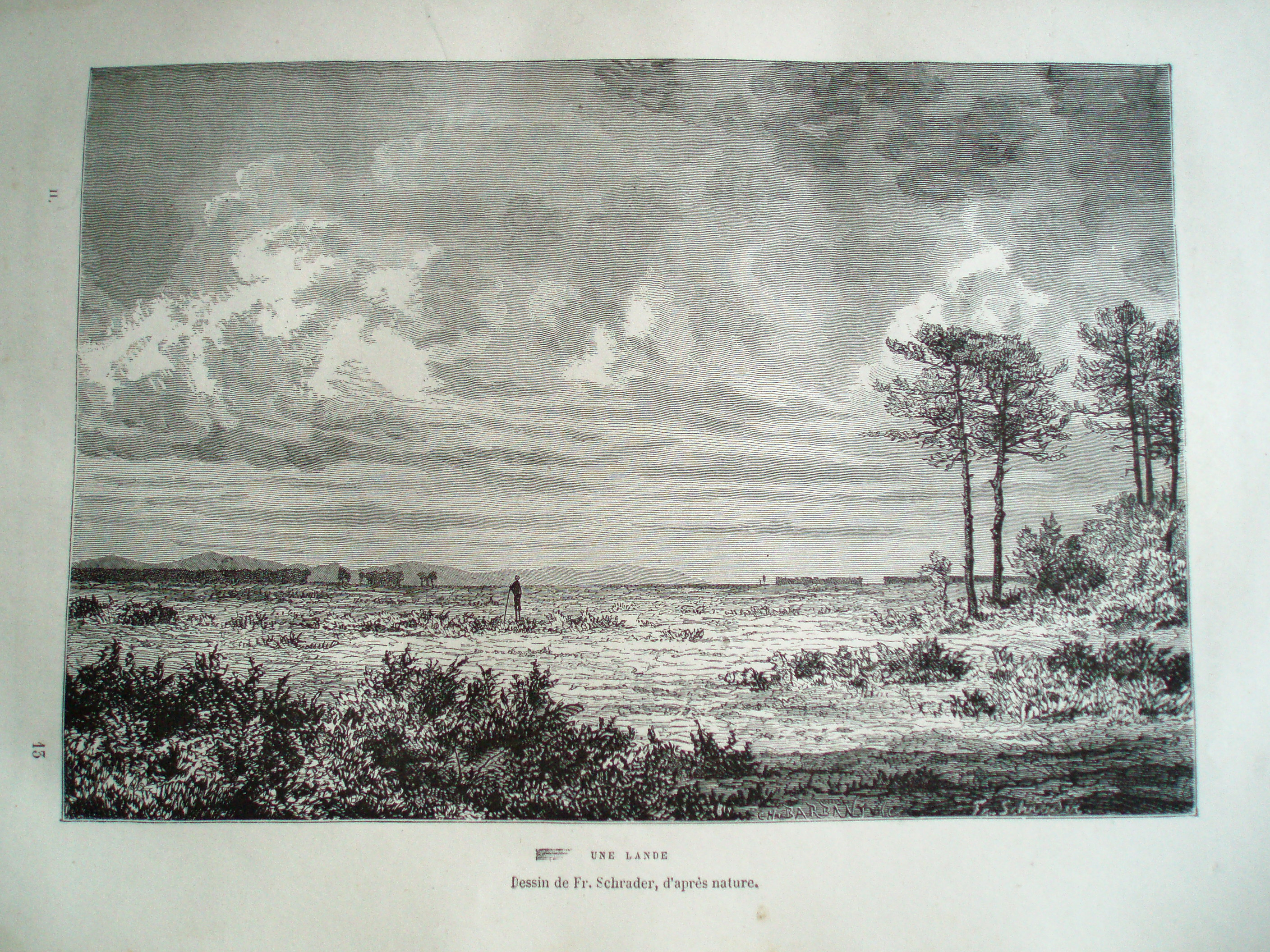 Une lande dans les Landes, dessin de Franz Schrader, in: Élisée Reclus, Nouvelle géographie universelle, t.2: La France, 1877, p. 97.